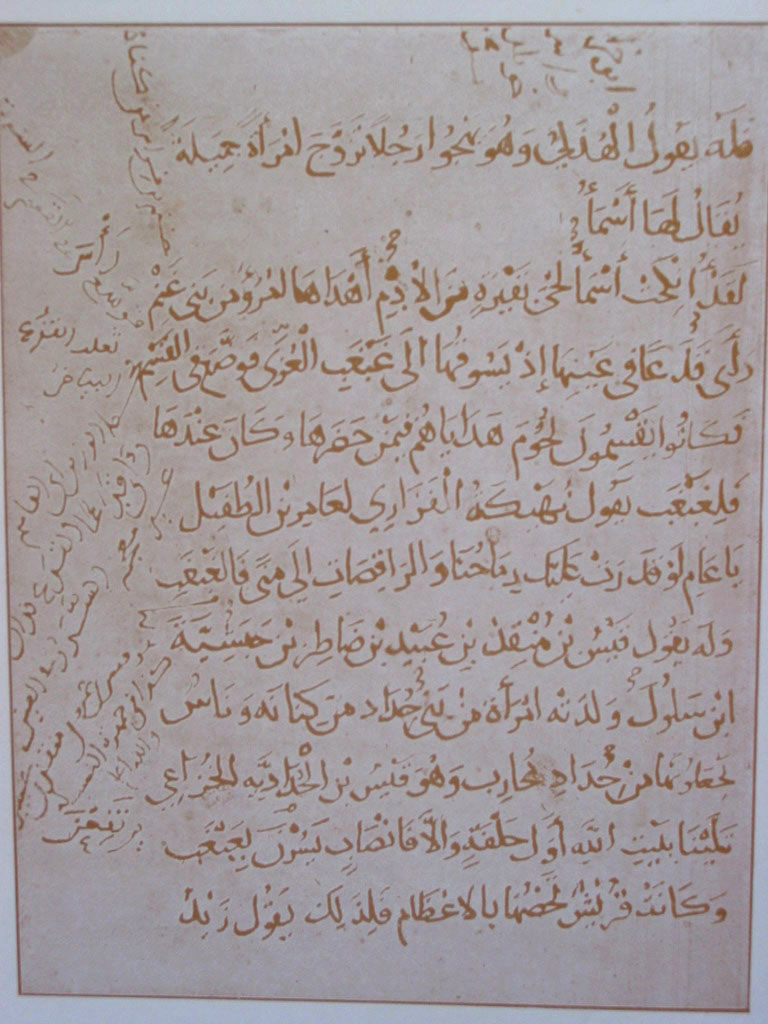 Faksimile aus einer Handschrift (12. Jahrhundert)